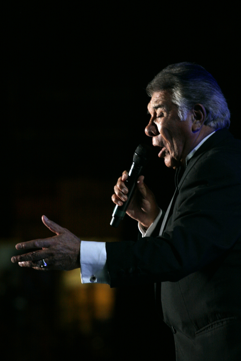 En esta ocasión, Raúl Lavié se presentó ante el público porteño. (Foto: Estrella Herrera)